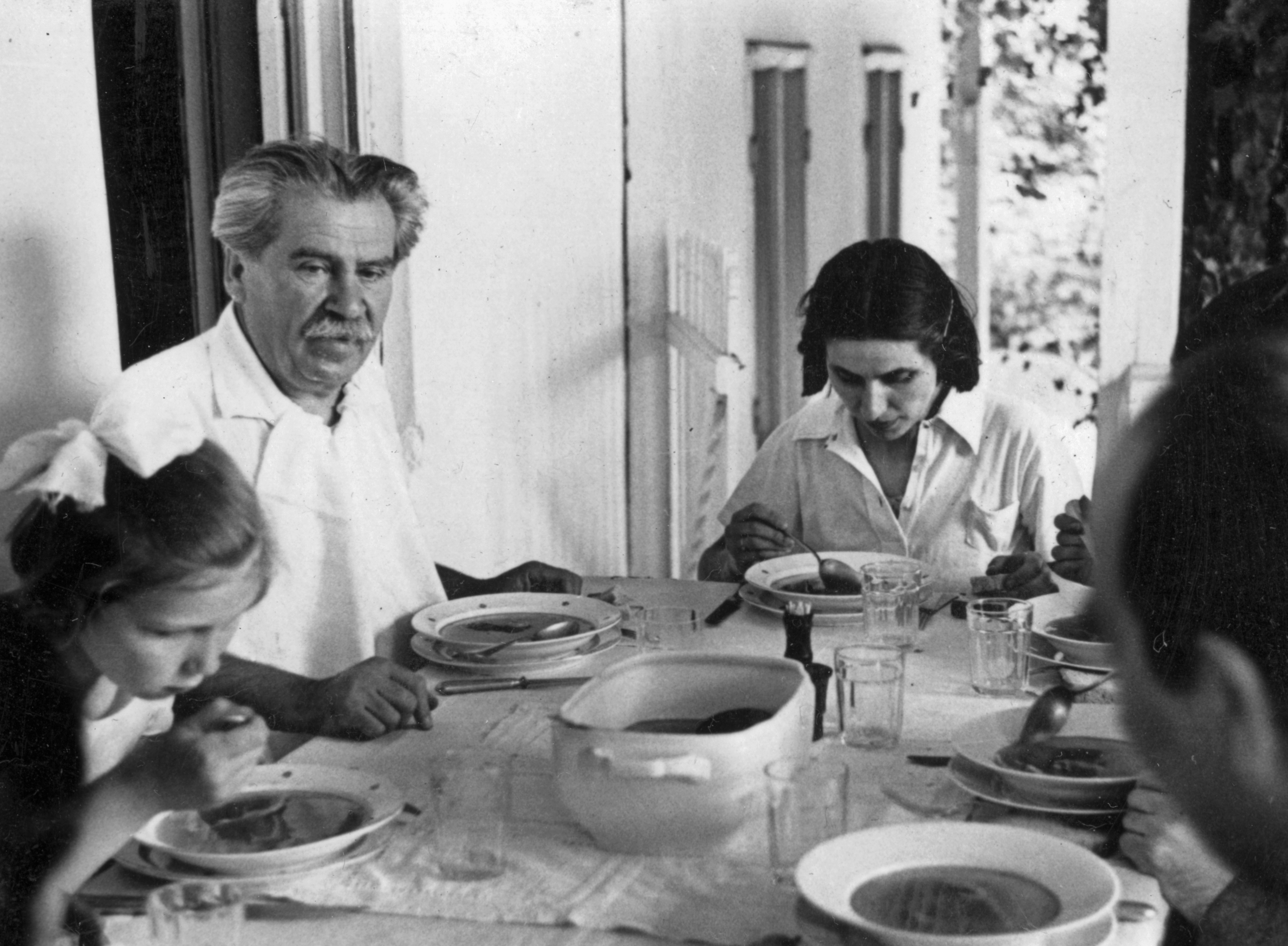 Móricz Zsigmond író. Location: Hungary Tags: celebrity Title: Móricz Zsigmond író.